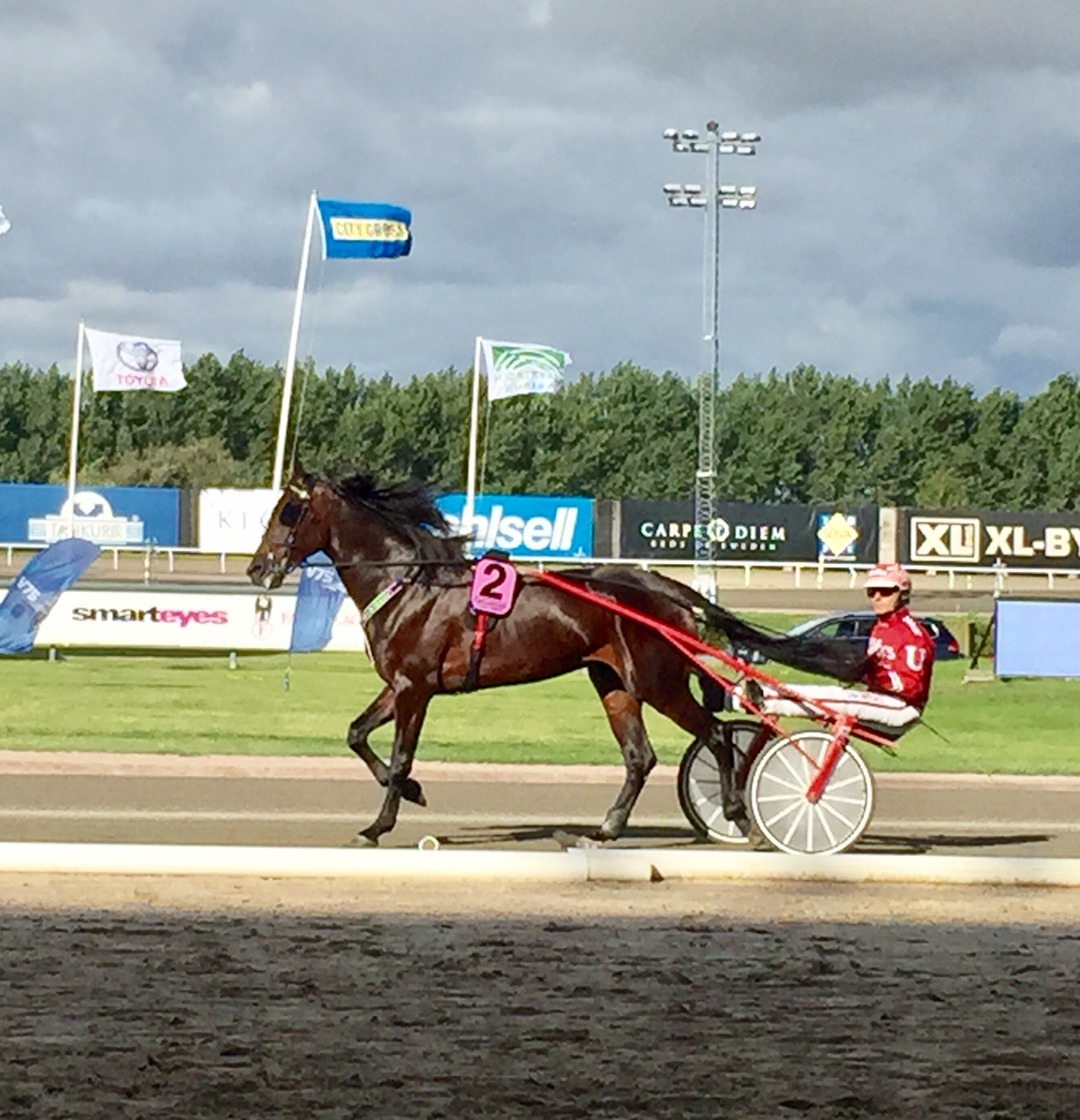 Peter Untersteiner och hästen Carabinieri inför finalen av Svenskt Travderby 2015 på Jägersro.